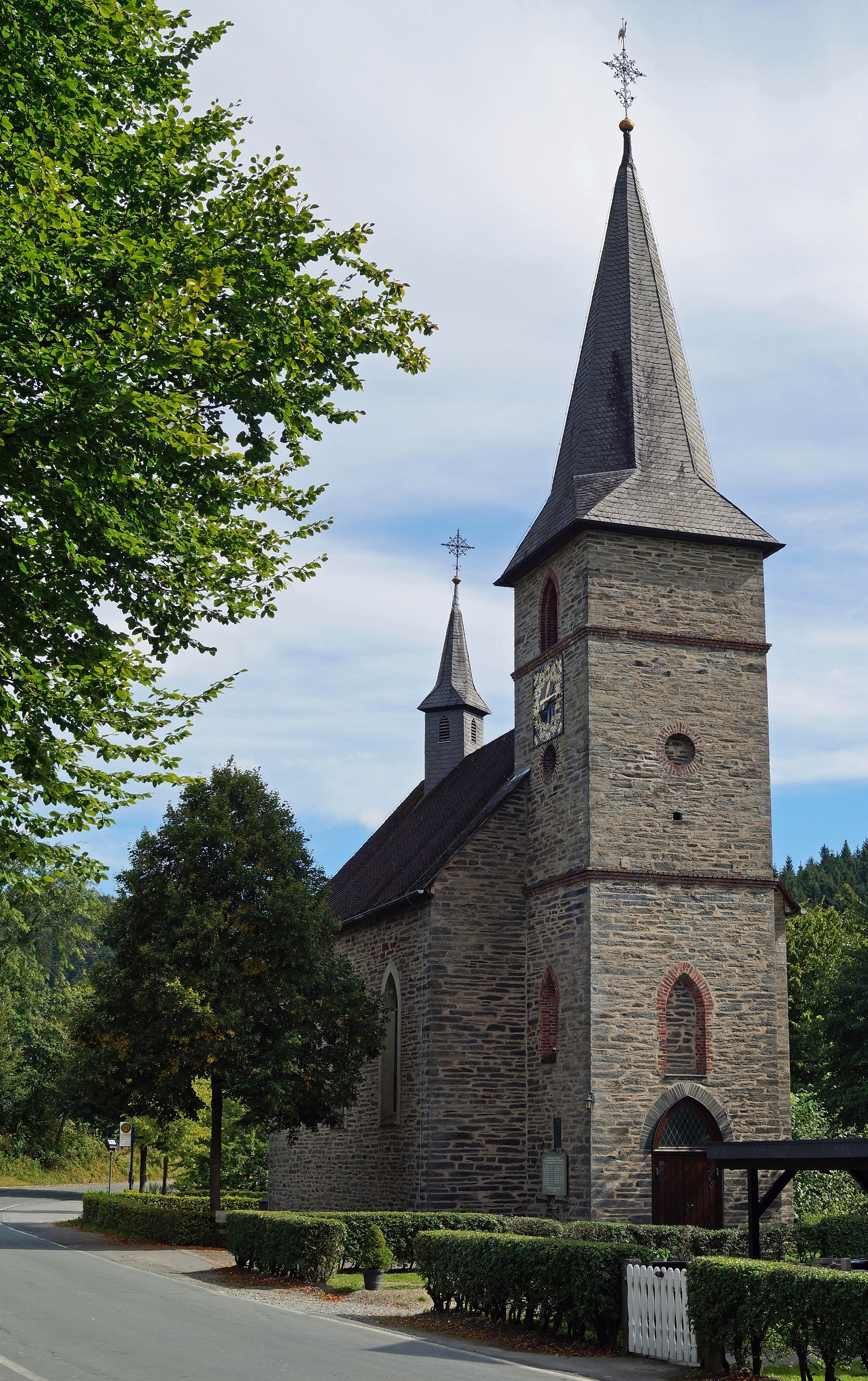 St.-Joseph-Kirche in Schmallenberg-Obersorpe